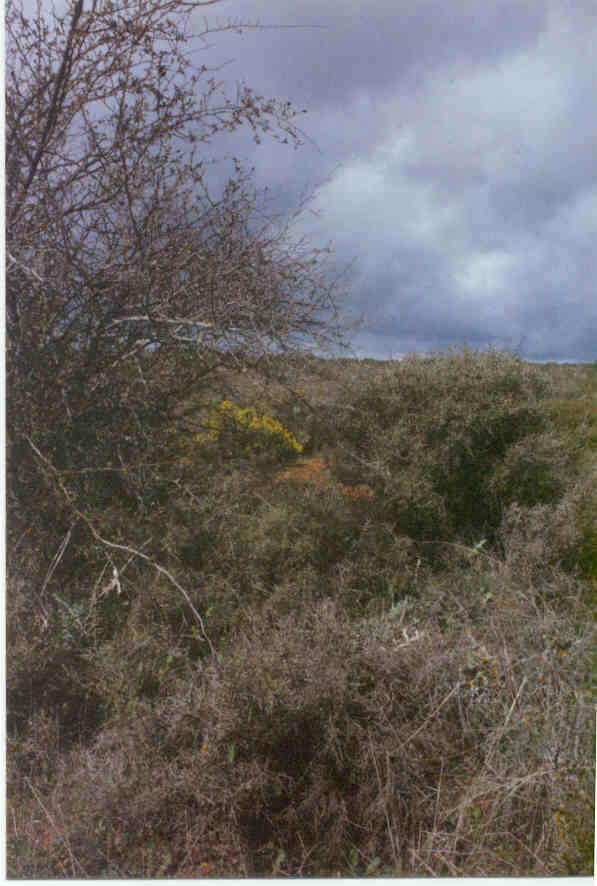 Aliagar rodeando el encinar. Foto propia.